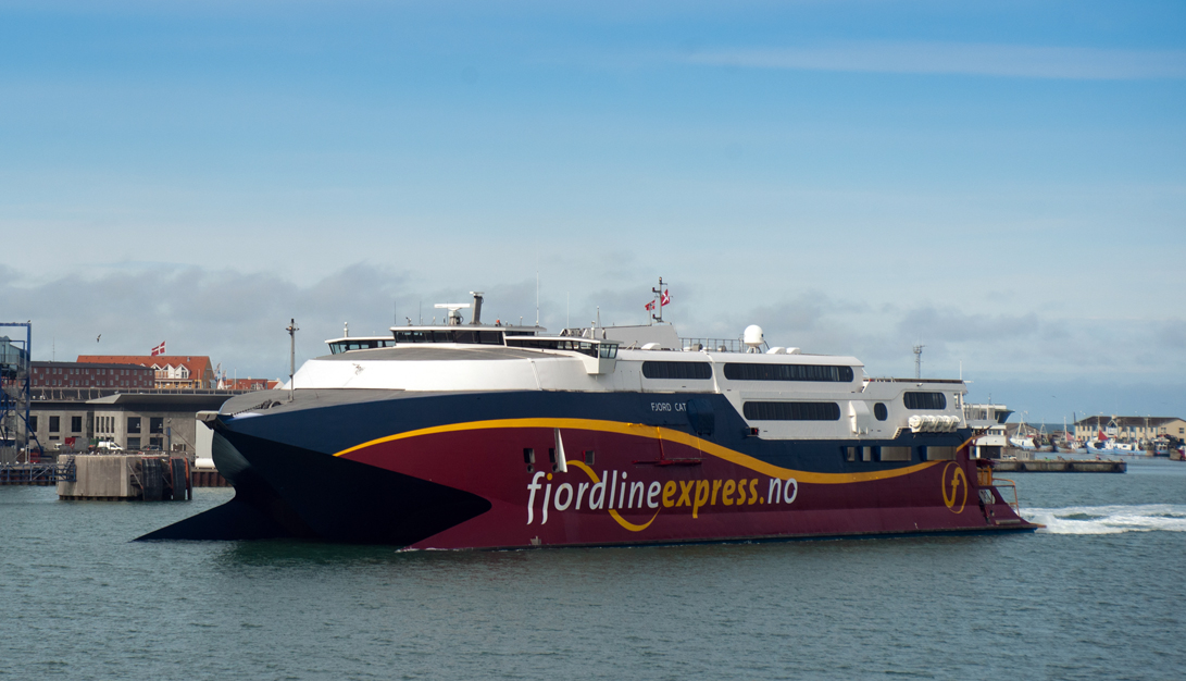 HSC Fjord Cat